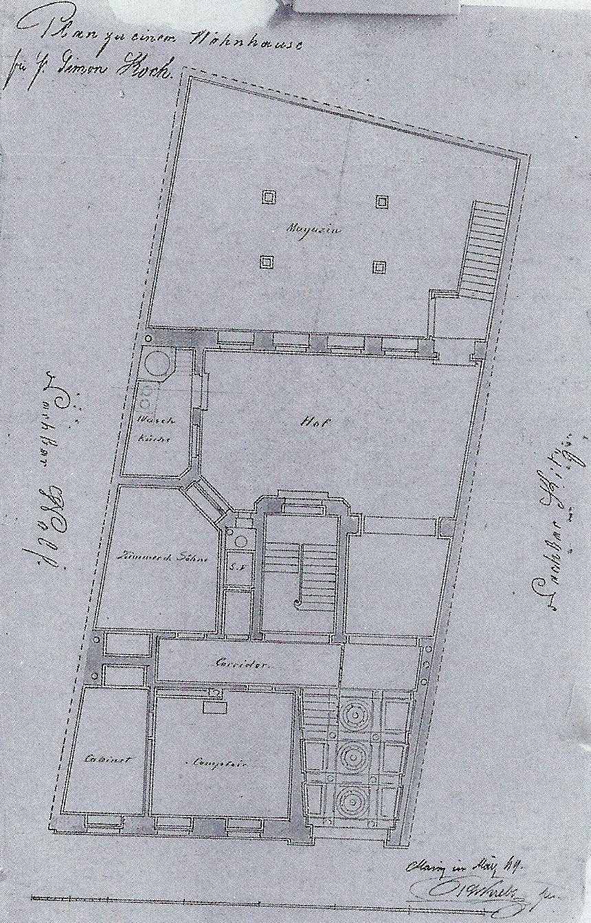 Bauplan eines Neubaus in der Kartäuserstraße 9 in Mainz-Altstadt von 1869